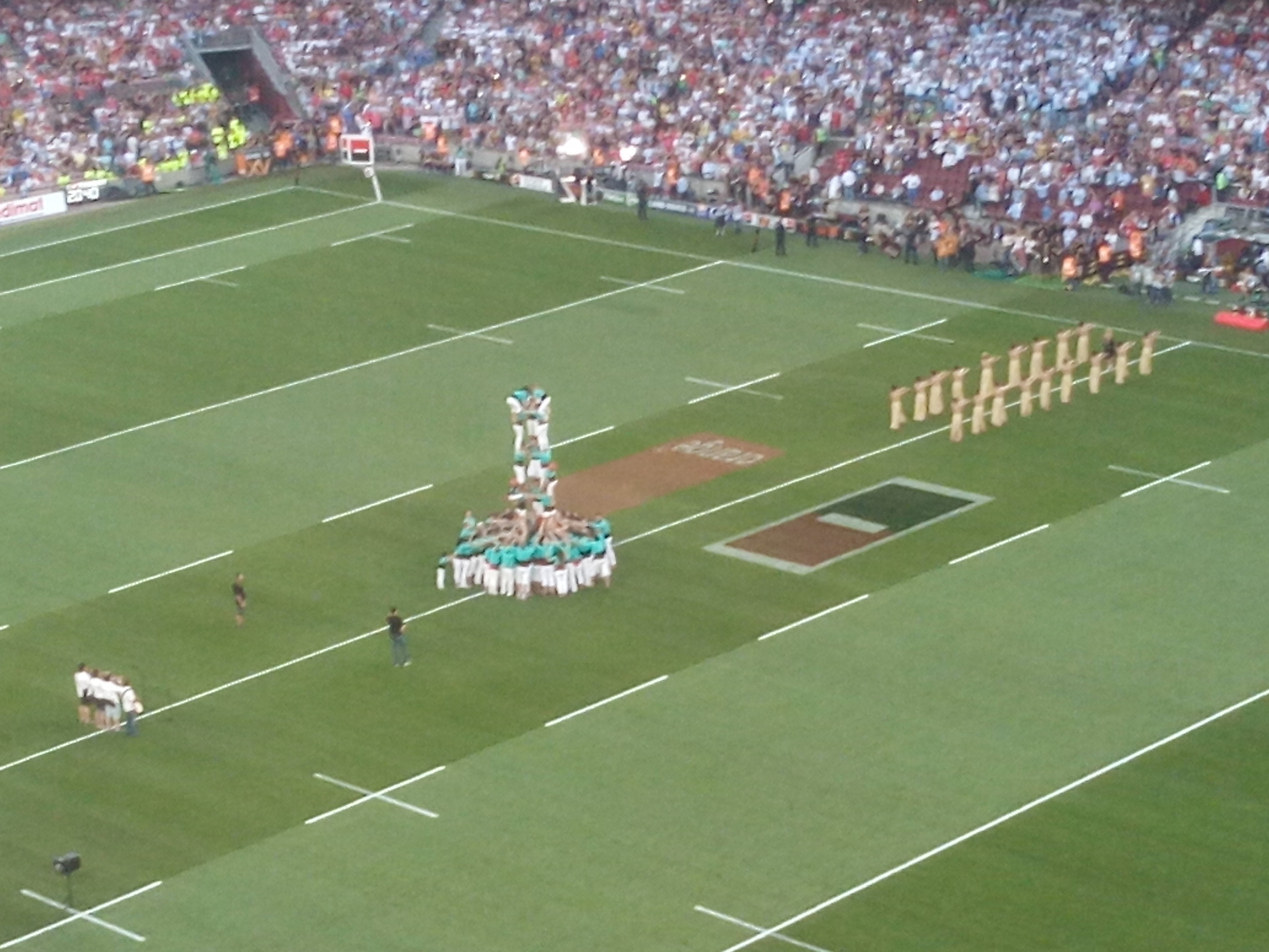 Castellers @ Top14 finale 2015-16